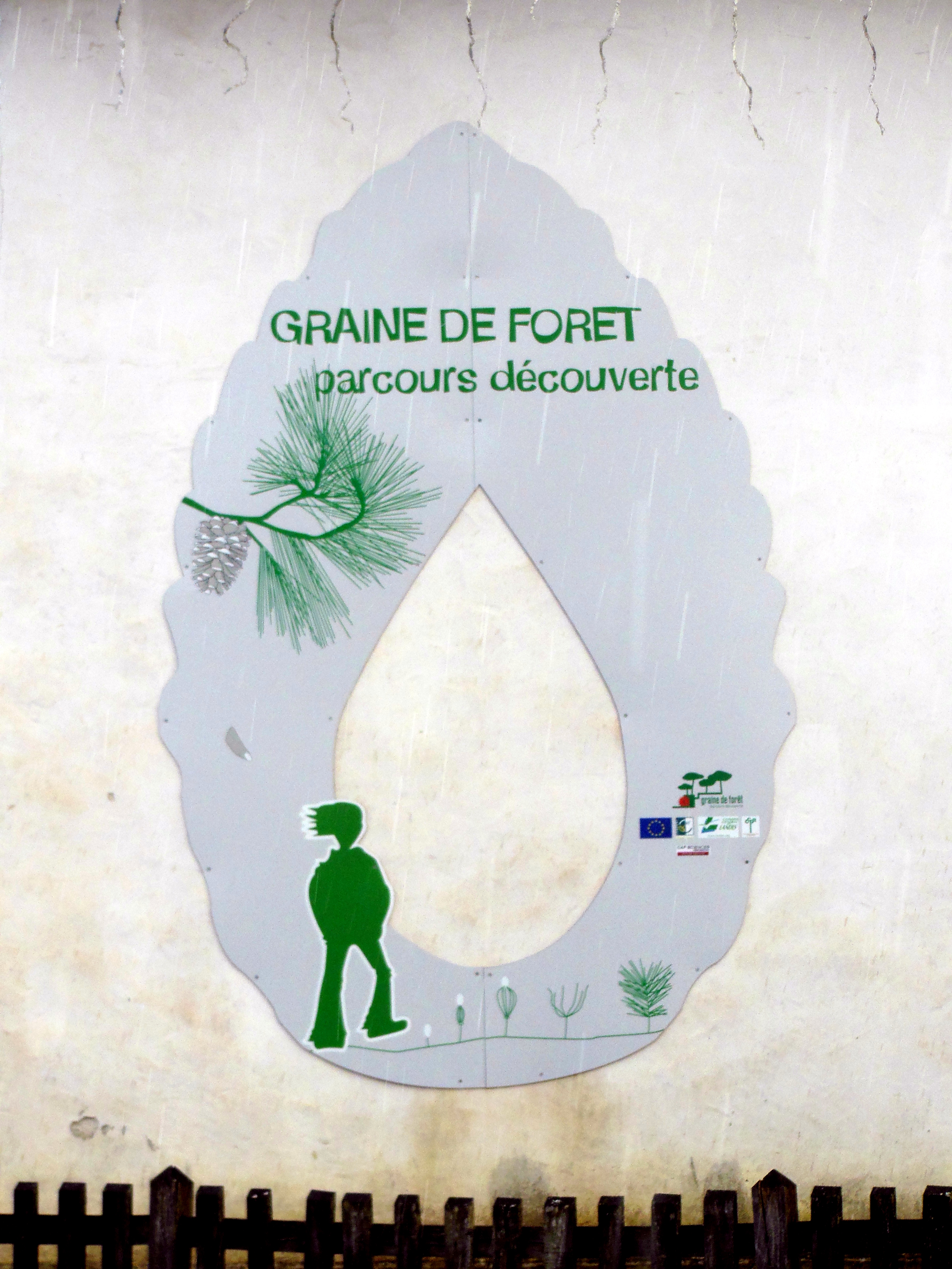 Logo du parcours Graine de forêt à Garein (Landes, France)